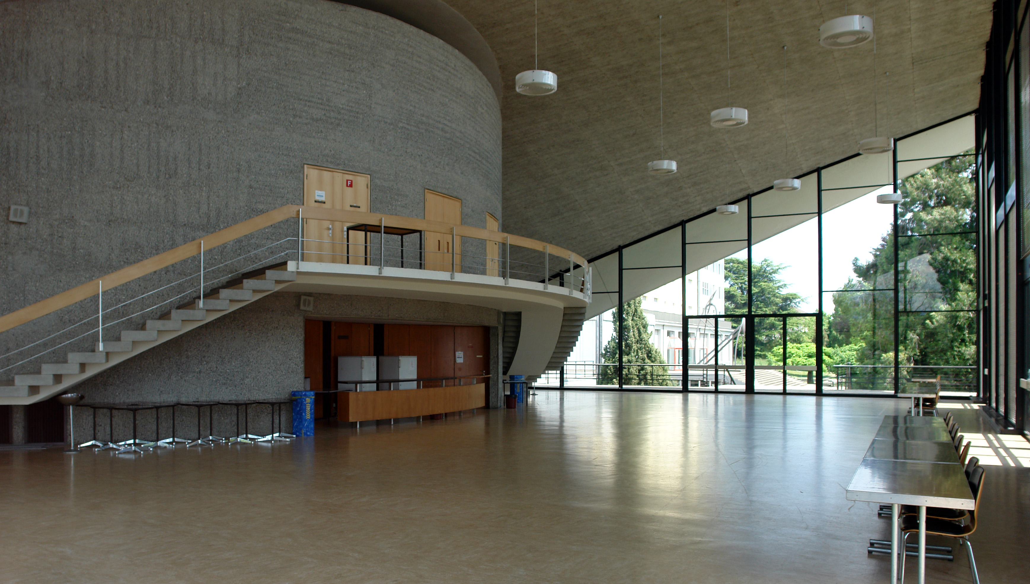 Auditorium of the Ecole Polytechnique Féderale de Lausanne, Lobby, Stairway